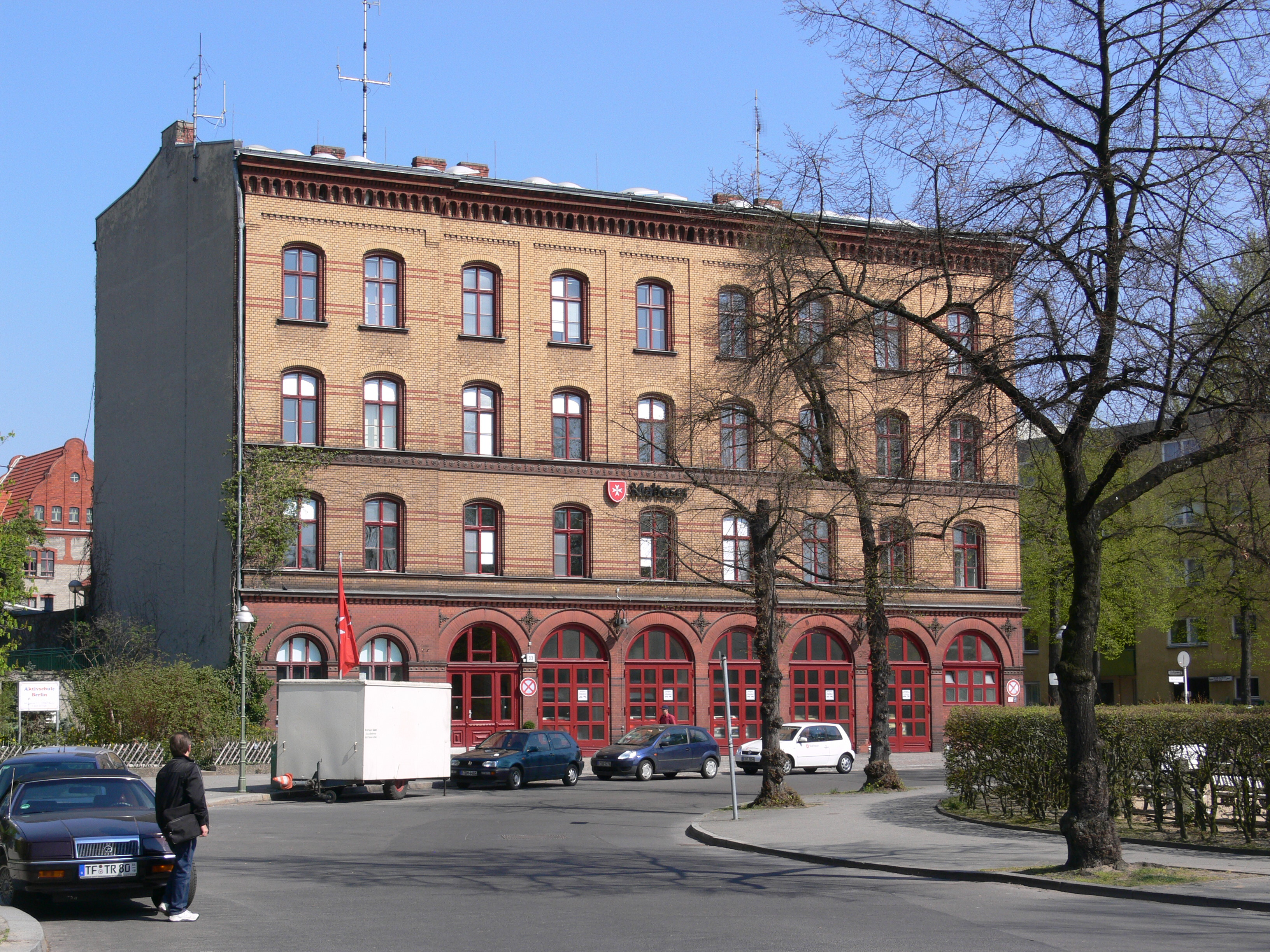 Berlin-Charlottenburg, Alt-Lietzow, ehem. Feuerwache Lietzow, heute Sitz der Malteser